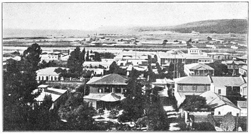 "Vina del Mar"